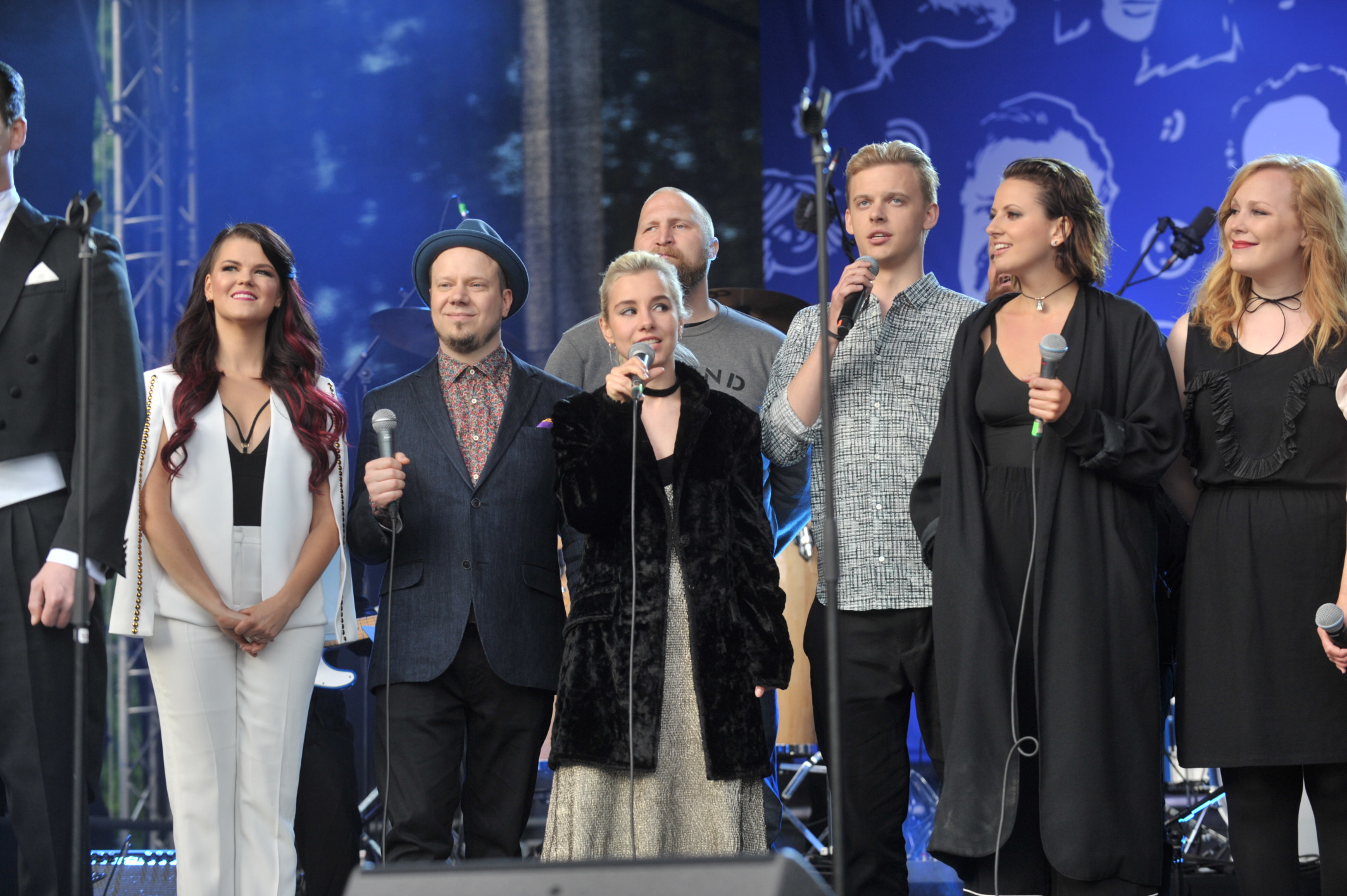 Suomi 100 -konsertissa 10.6.2017 esiintyivät yhdessä suomalaiset ja virolaiset muusikot. Vasemmalta: Saara Aalto, Tuomo, Iiris, Paleface, Jüri Pootsmann, Ronya, Pauliina Kokkonen.